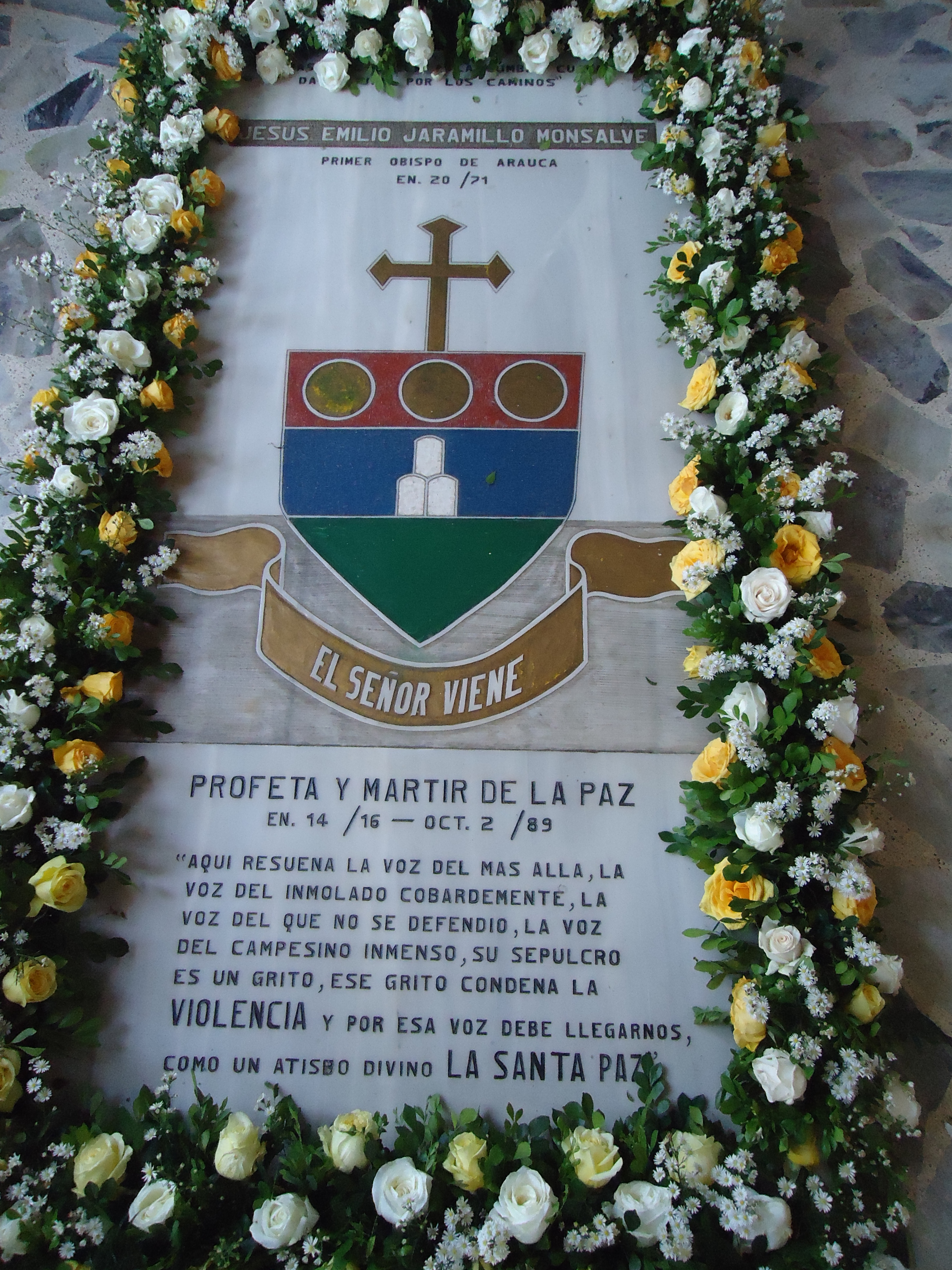 Lápida que contiene el escudo episcopal de Mons. Jesús Emilio Jaramillo Monsalve con datos de su vida y un texto fúnebre.